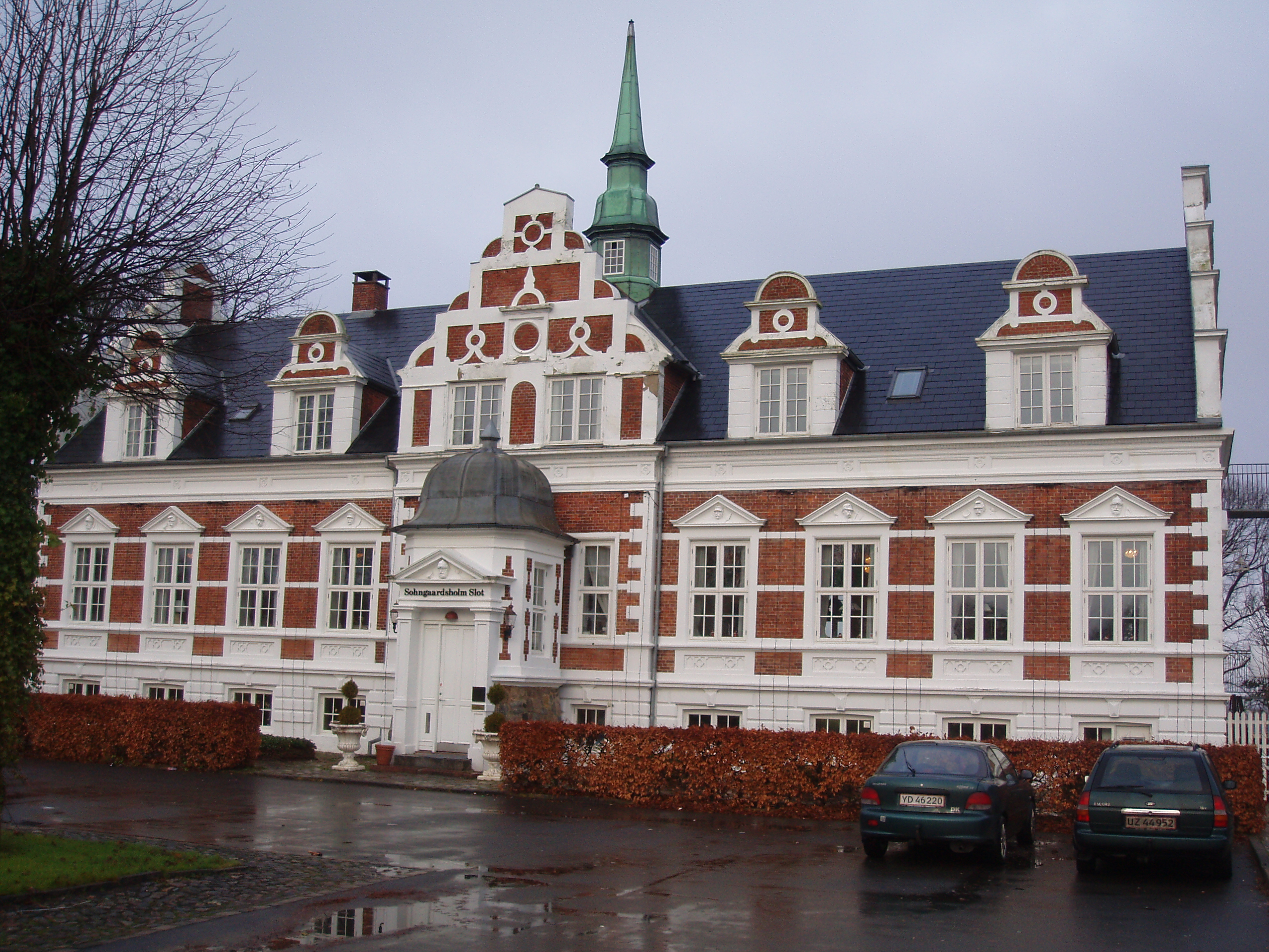 Sohngaardsholm, Aalborg, Denmark